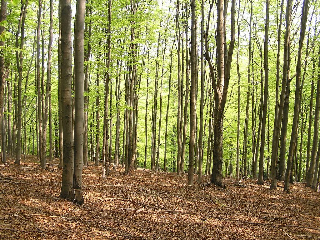 Bukový les na svahu kopce Bouřný (703 m) v Lužických horách. Fotografováno během výstupu na vrchol z jižní či jihozápadní strany 6. května 2006. Autor: Jakub Friedl